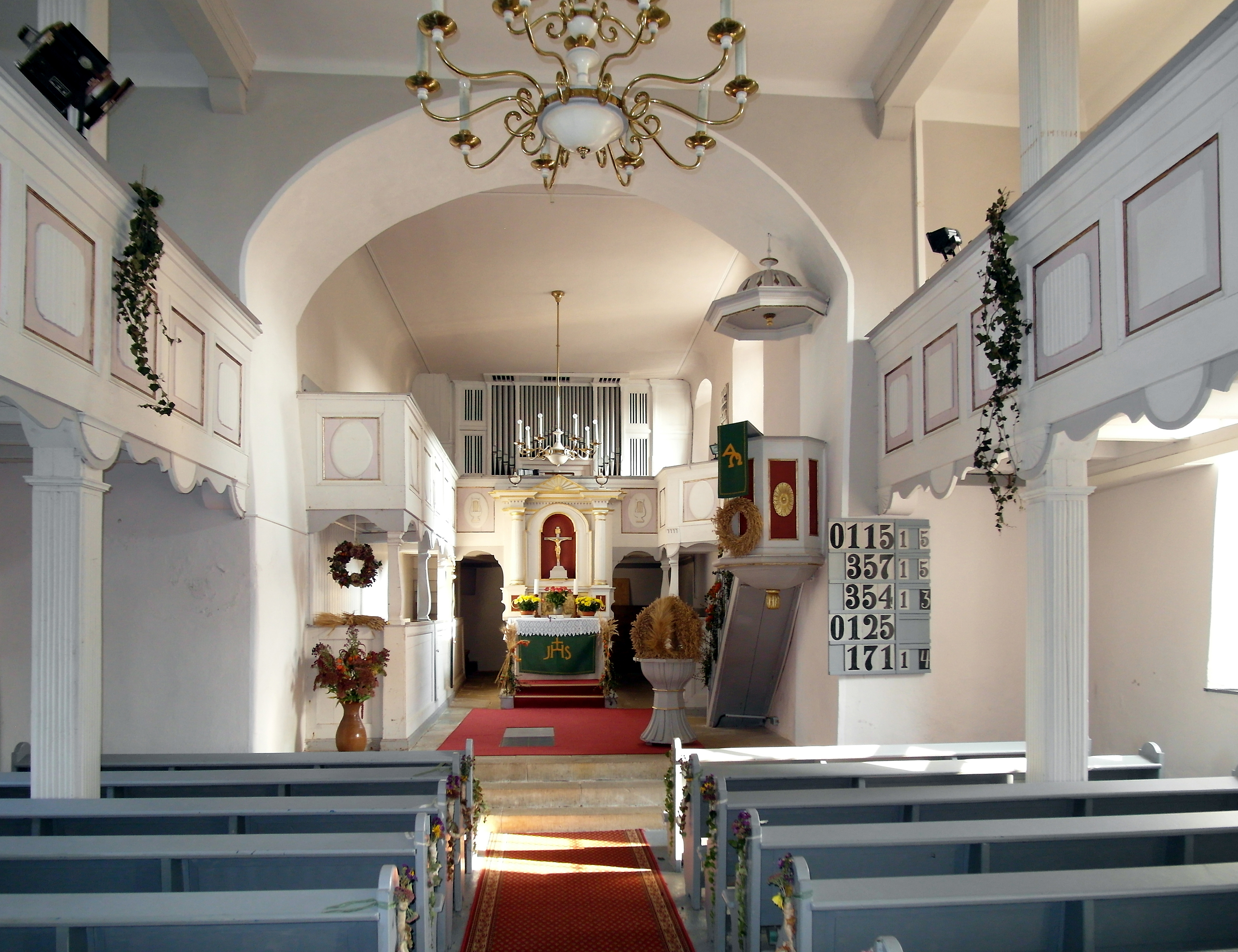 18.10.2018 01833 Lauterbach (Stolpen), Dorfstraße 53 (GMP: 51.067278,14.118169): Die St.-Martins-Kirche entstand um 1495 als katholische Kapelle. Die heutige Dorfkirche besteht aus zwei Bauteilen, wobei der östliche der ältere ist und bereits im 12./13. Jahrhundert entstand. Sie ist eine Saalkirche mit geschlossenem Chor. 1870 erfolgte ein größerer Umbau. Kirchenschiff, Sicht nach Osten zum Chor mit Altar und Orgel. [SAM8338.JPG]20181018345DR.JPG(c)Blobelt